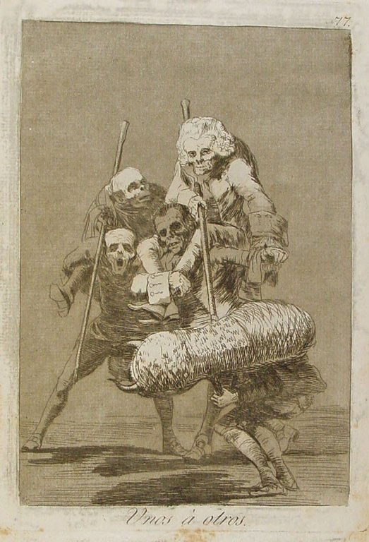 Capricho nº 77: Unos a otros de Goya, serie Los Caprichos